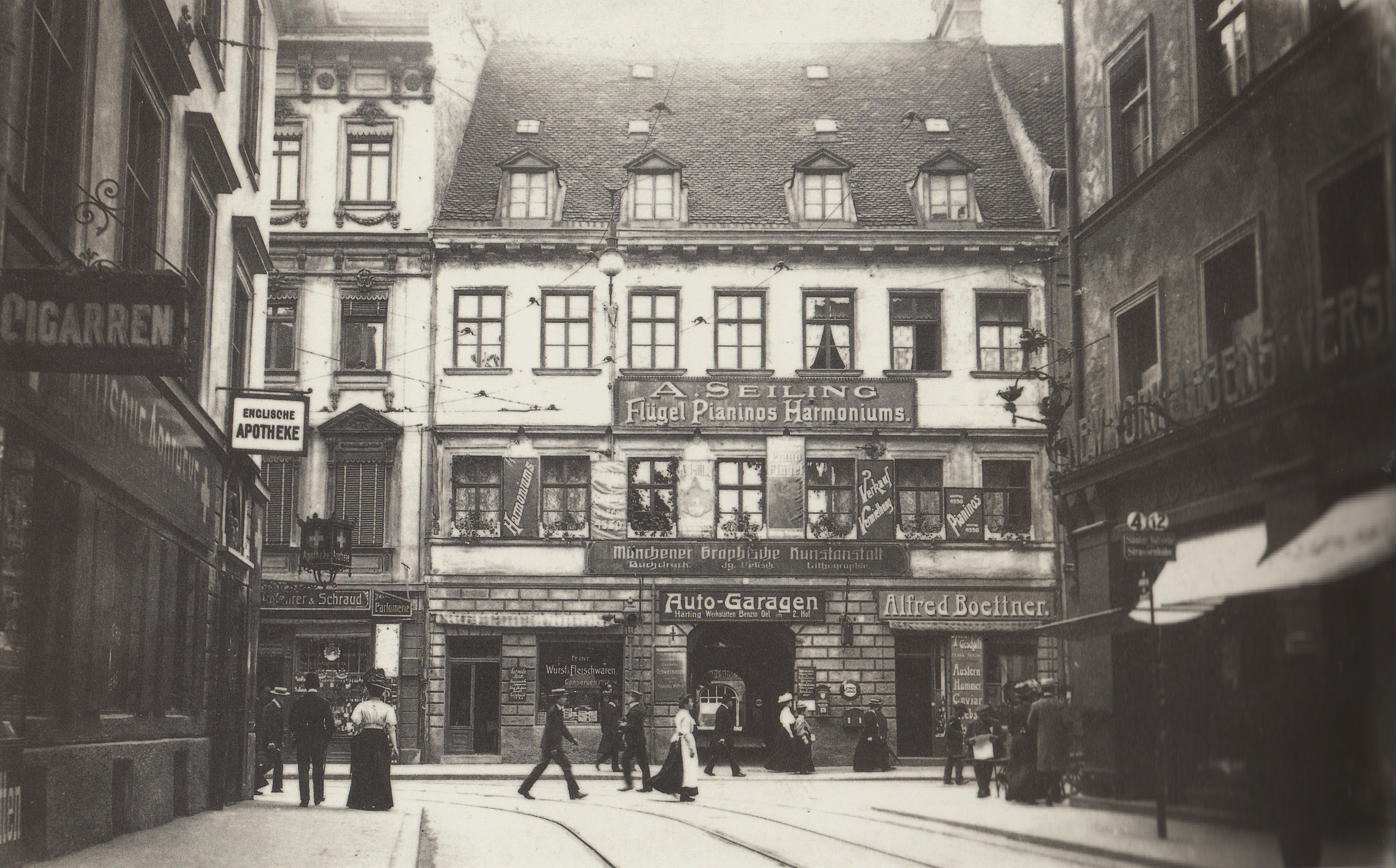 Blick von der Münchner Perusastraße auf die Theatinerstraße 8 (1908). Das Gebäude hatte von 1880 bis 1905 die miltärische Stadtkommandatur beherbergt. Links ist ein Teil des ehemaligen Palais Arco zusehen. Beide Bauten, die noch aus dem 18. Jahrhunder stammten, wurden 1908–10 durch Neubauten ersetzt.